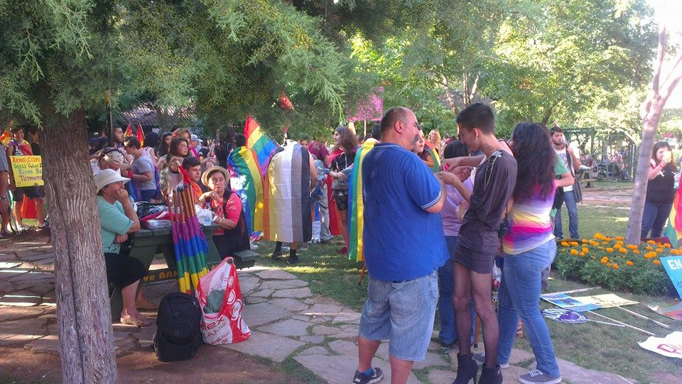 İzmir'de ikincisi gerçekleştirilen Onur Yürüyüşü öncesi yapılan hazırlıklardan görünüm, 2014.